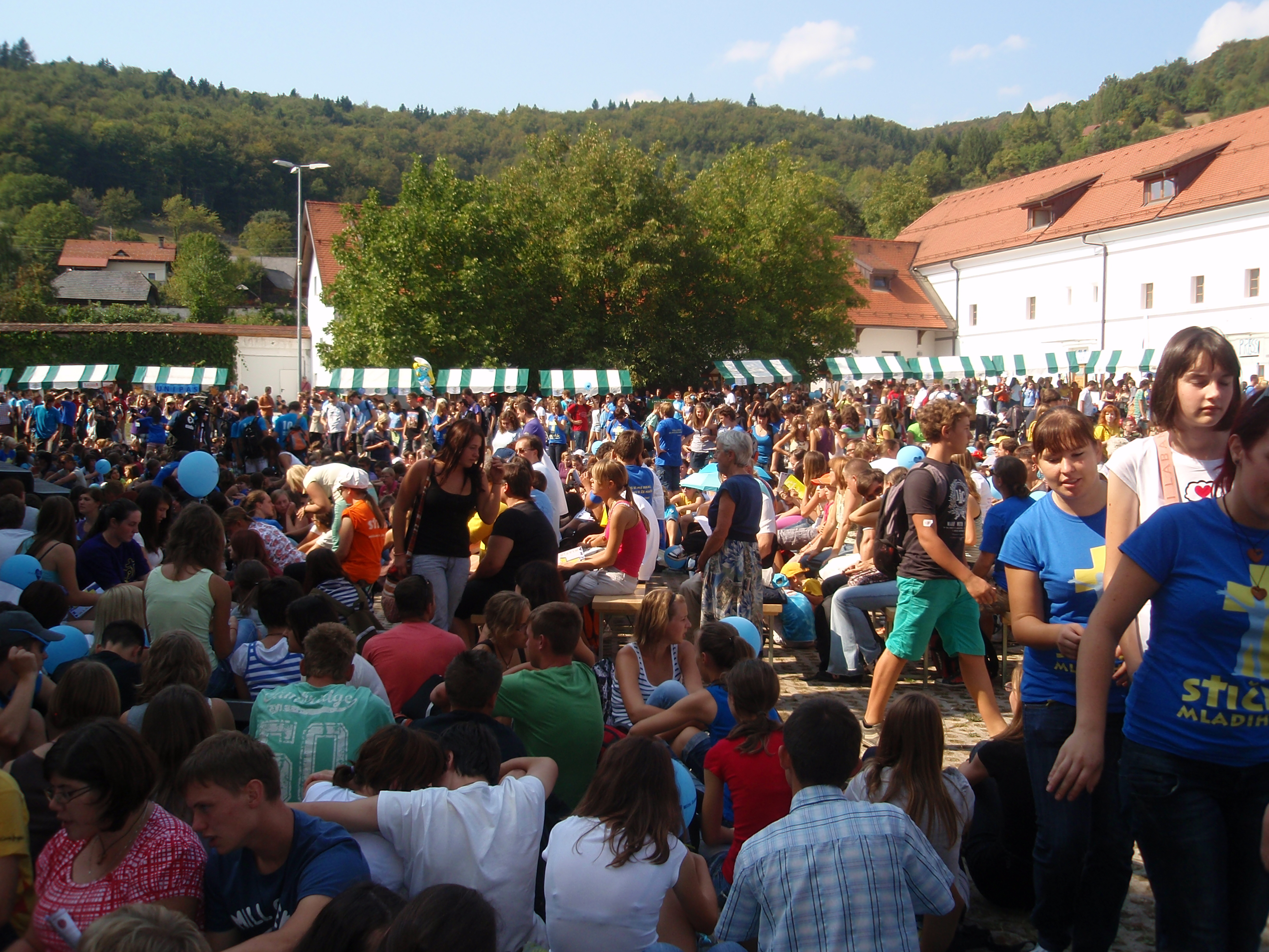 Stična mladih 2011